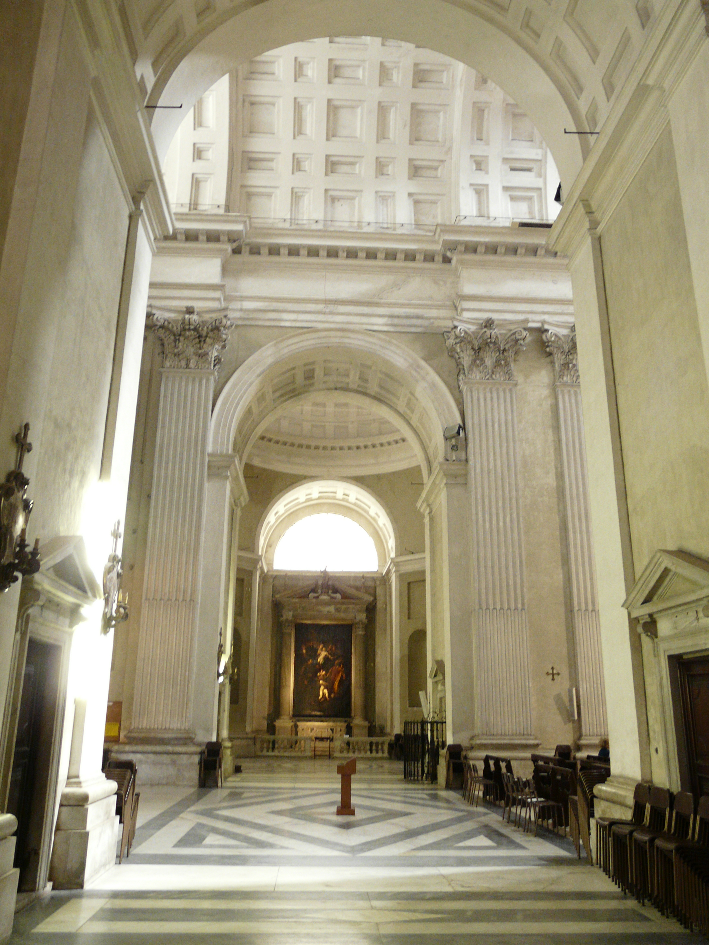 Basilica di Santa Maria Assunta di Carignano, Genova, Liguria, Italia